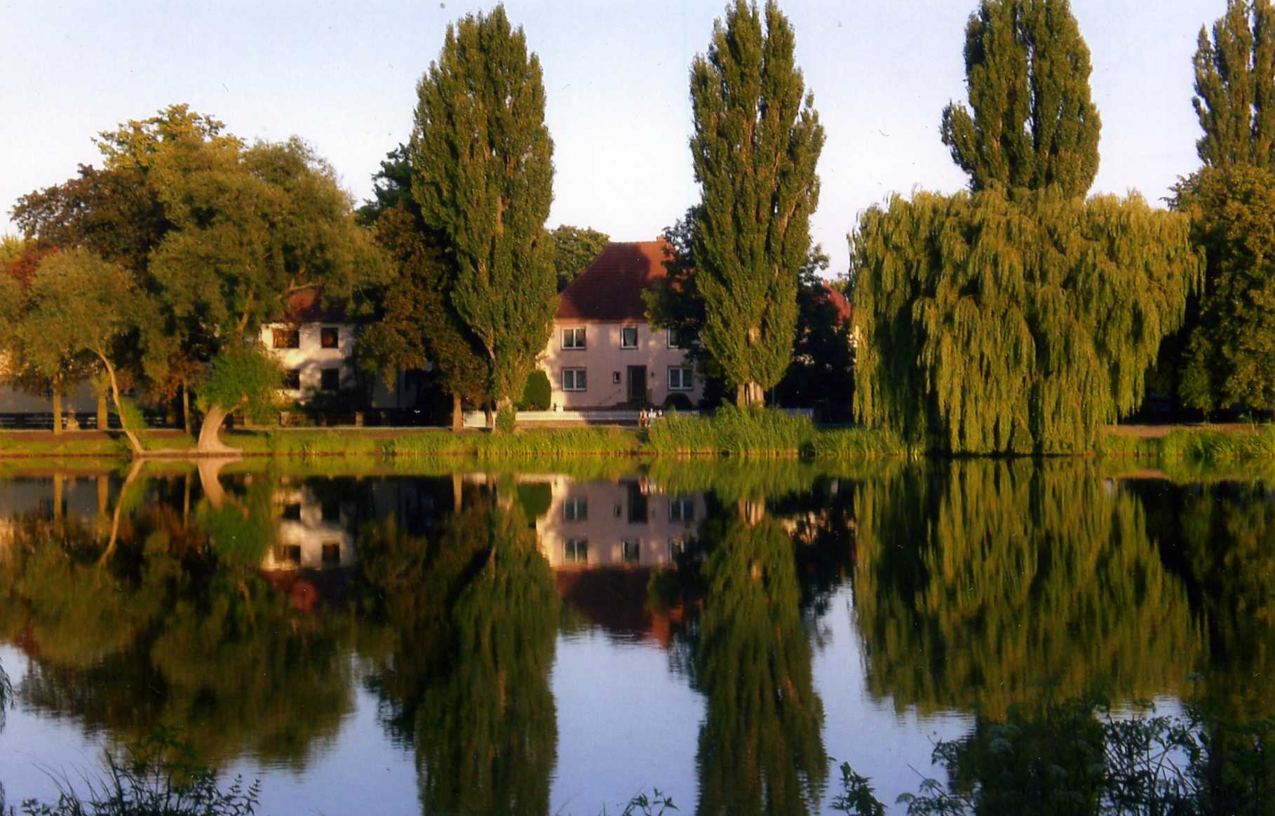 Villen am Stadtsee in Stendal